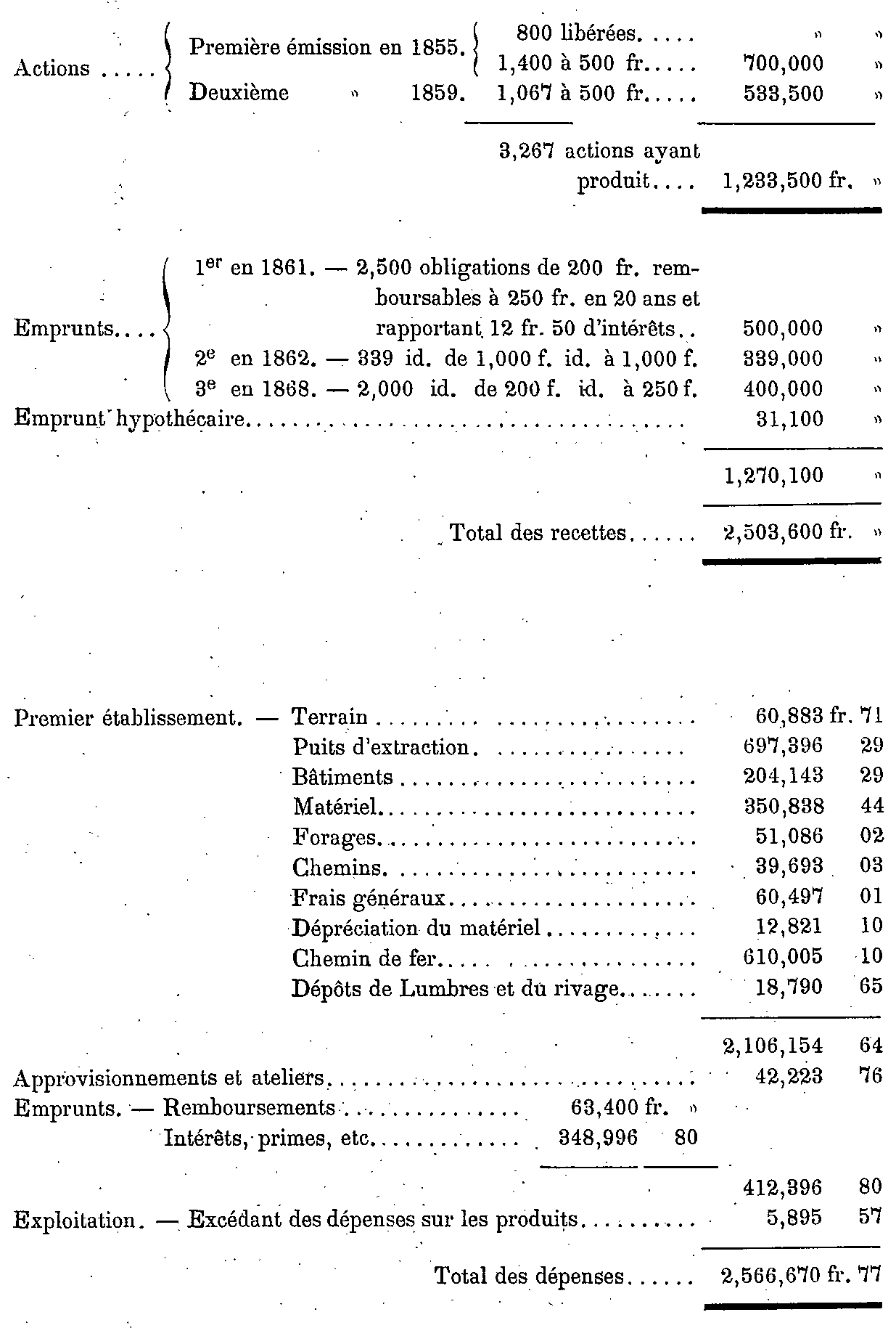 Recettes et dépenses de 1855 à 1872 de la Compagnie des mines de la Lys-Supérieure.